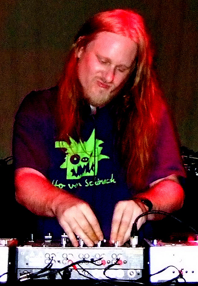 Crop of File:Venetian Snares Berlin 2008 1.jpg on en.